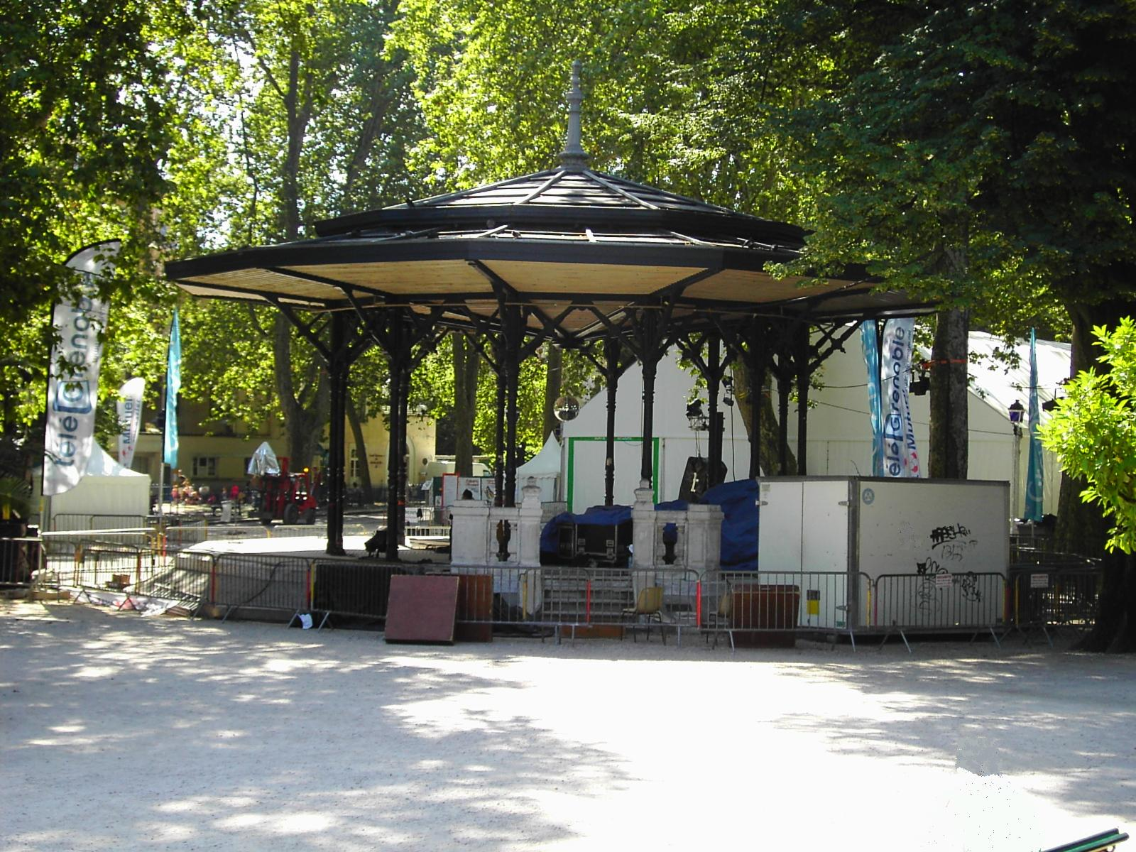 Kiosque du jardin de ville servant au festival le Cabaret frappé. En arrière plan, le chapiteau pour les concerts payants.